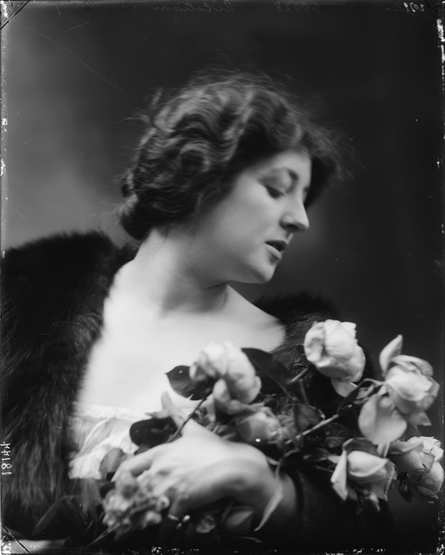 Olga Vittoria Gentilli